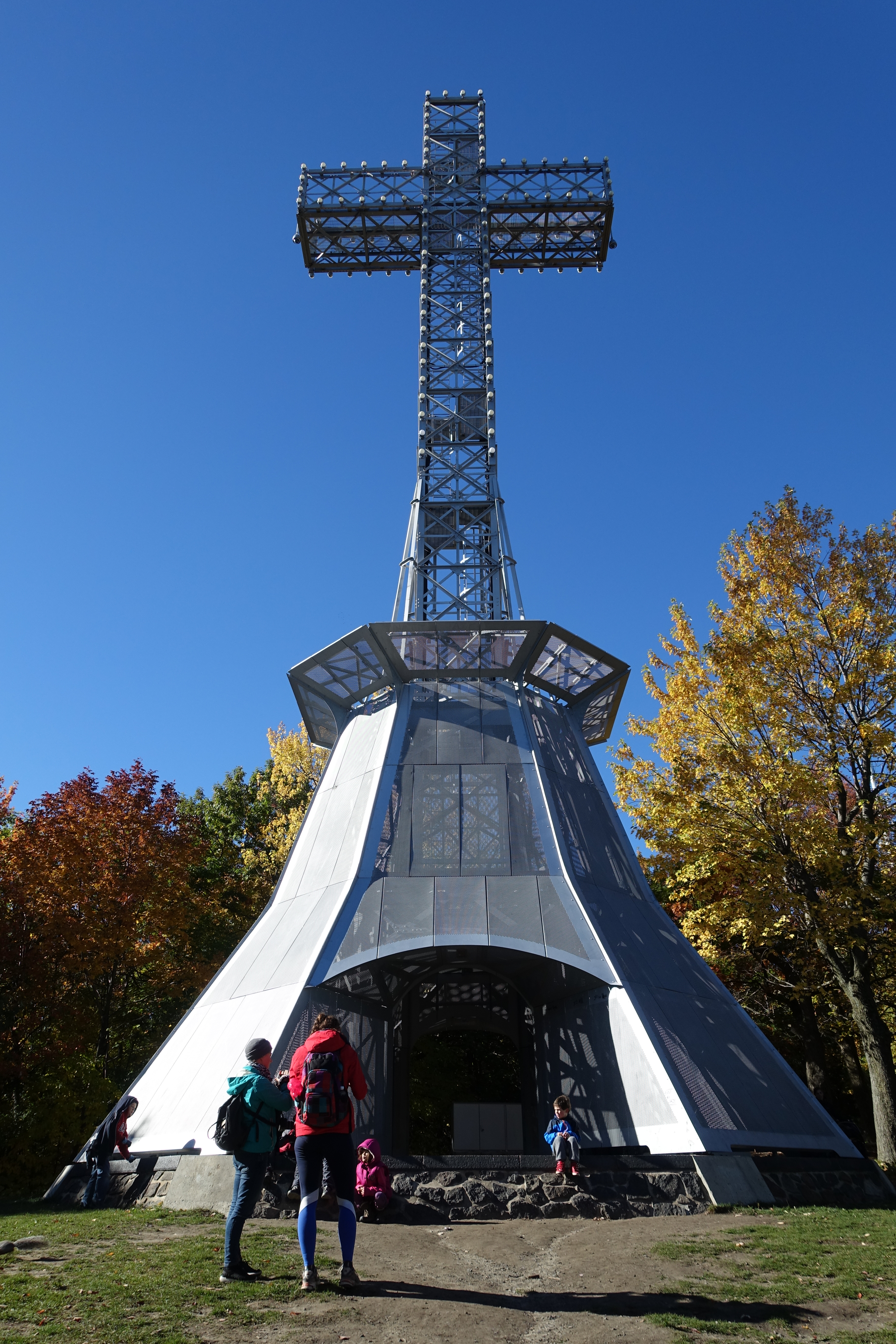 Cross @ Mount Royal @ Ville-Marie @ Montreal